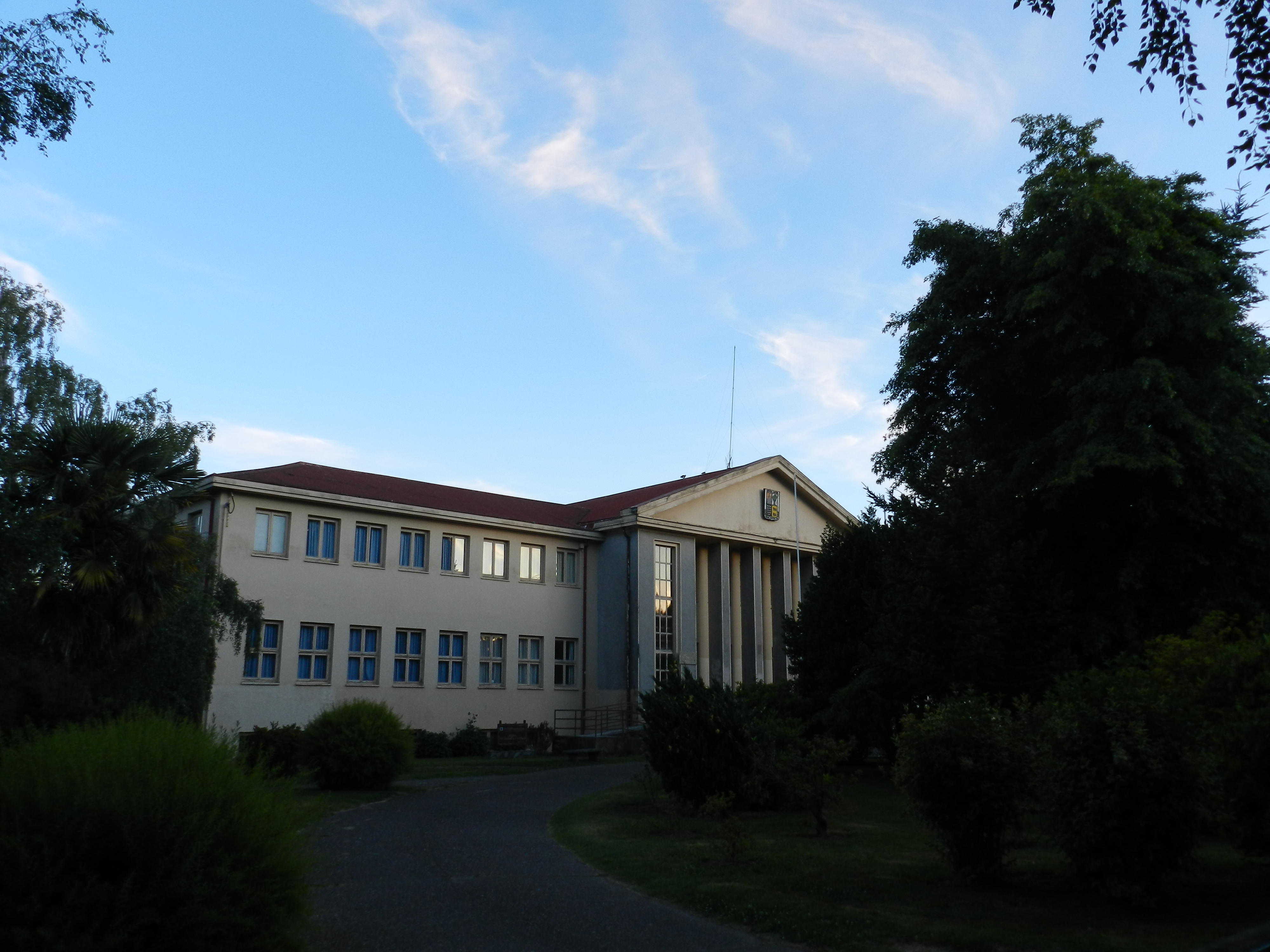 Edificio de la UACh en Valdivia